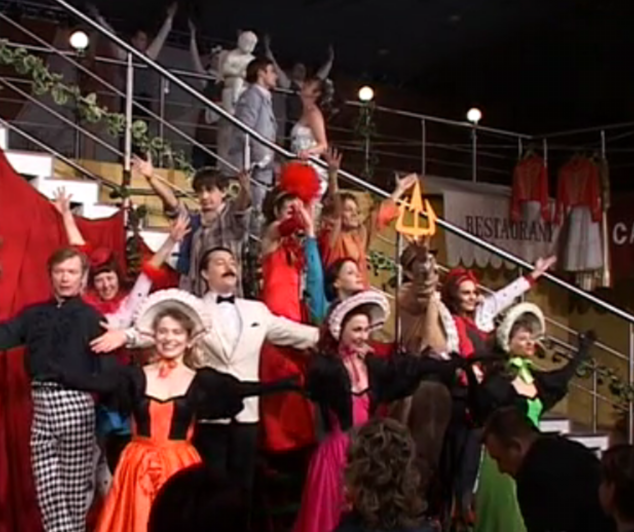 Спектакль "Под небом Парижа" по оперетте "Фиалка Монмартра", Мытищинский театрдрамы и комедии "ФЭСТ"